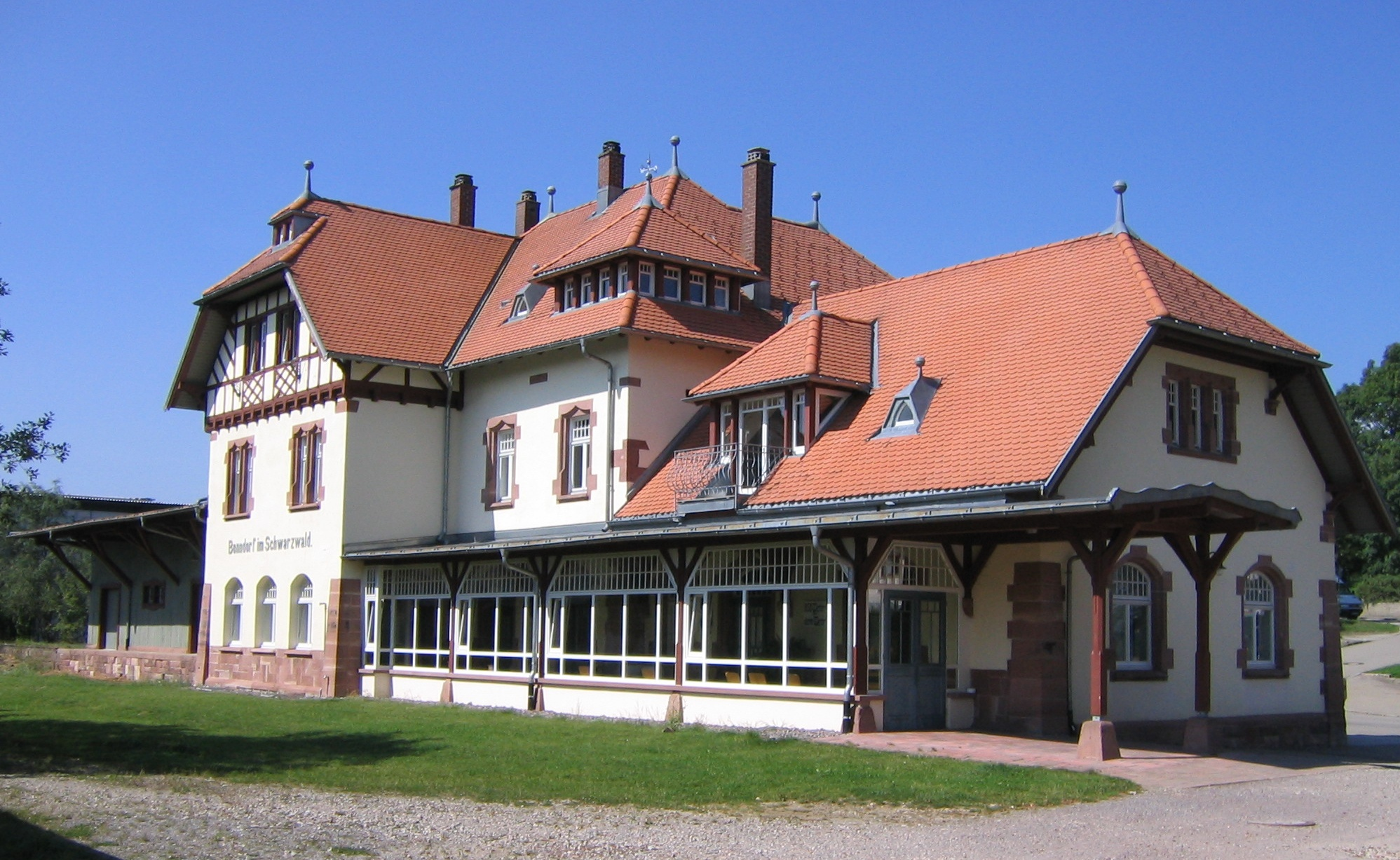 Former station of Bonndorf, Baden-Württemberg, Germany